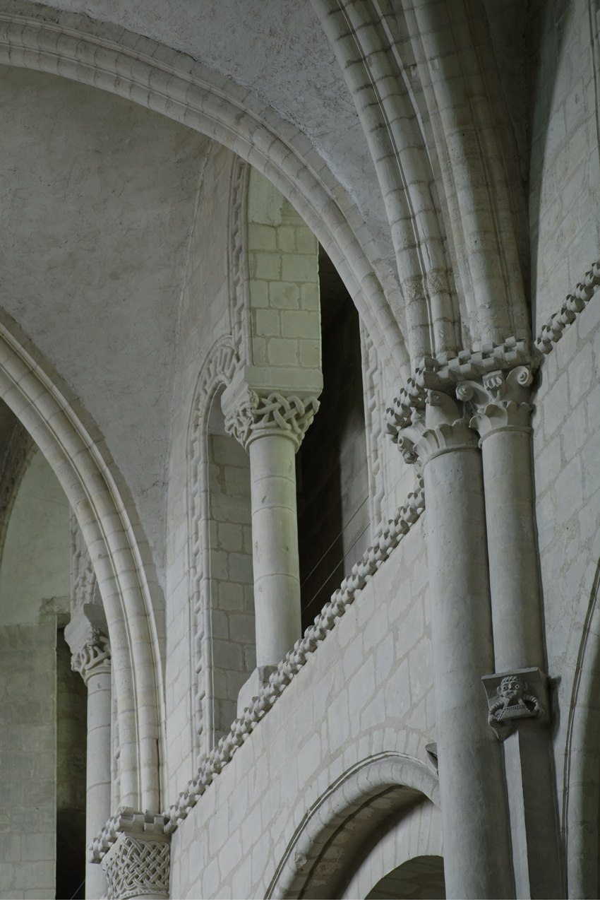 This building is en partie classé, en partie inscrit au titre des Monuments Historiques. .